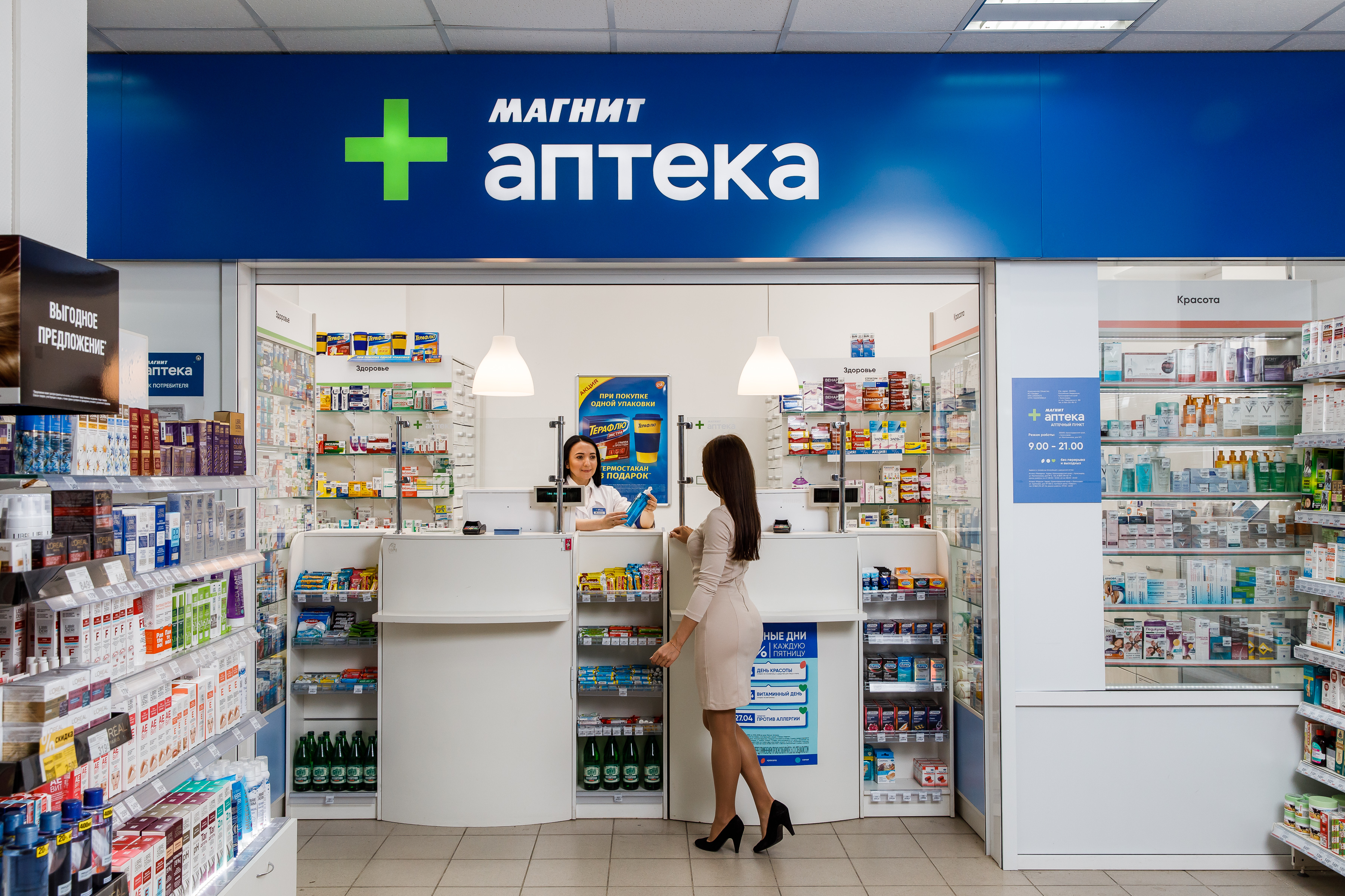 Точка Магнит Косметик